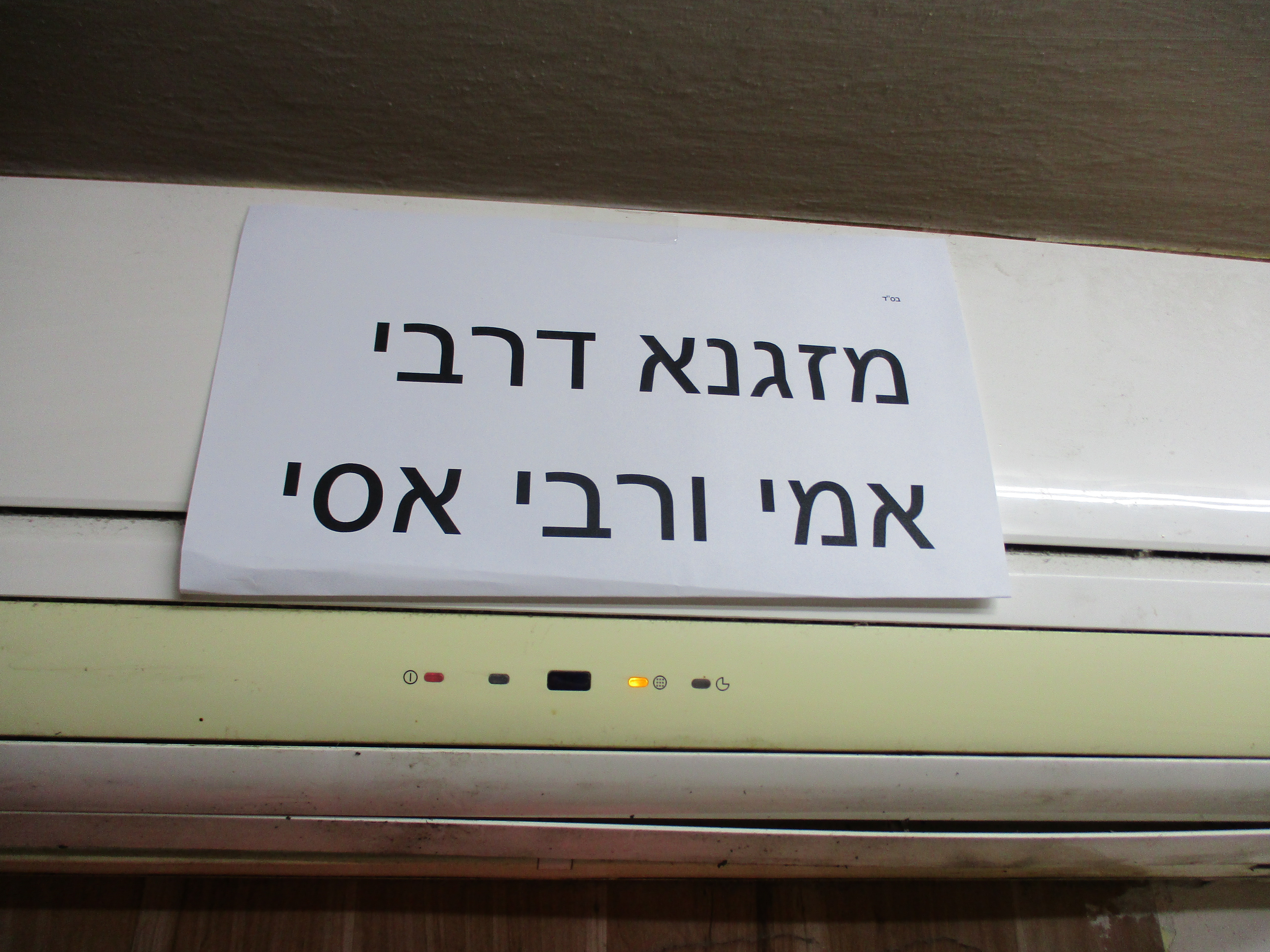 יהודי שתלה שלט זה על מזגנו שלא להוציא דיבת הארץ